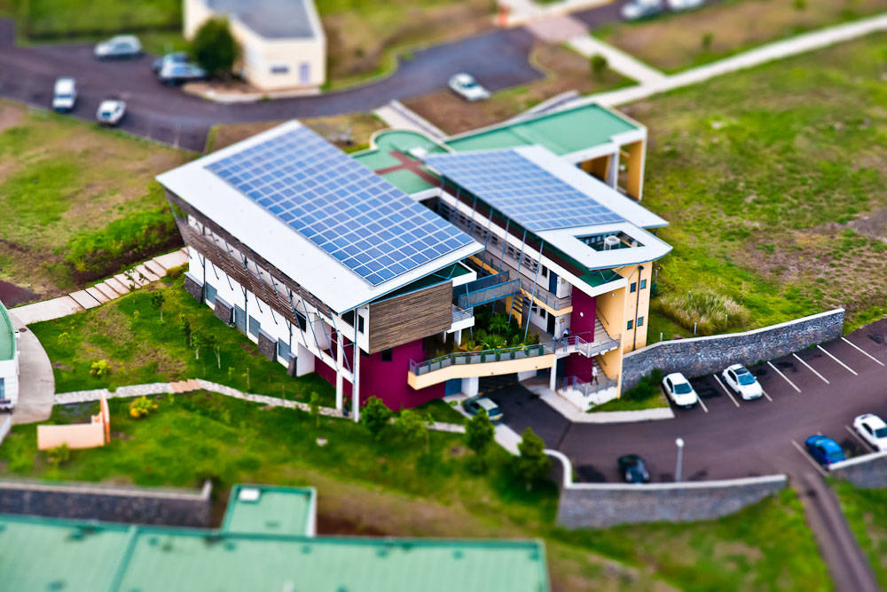 Bâtiment à énergie positive de l'IUT de Saint-Pierre